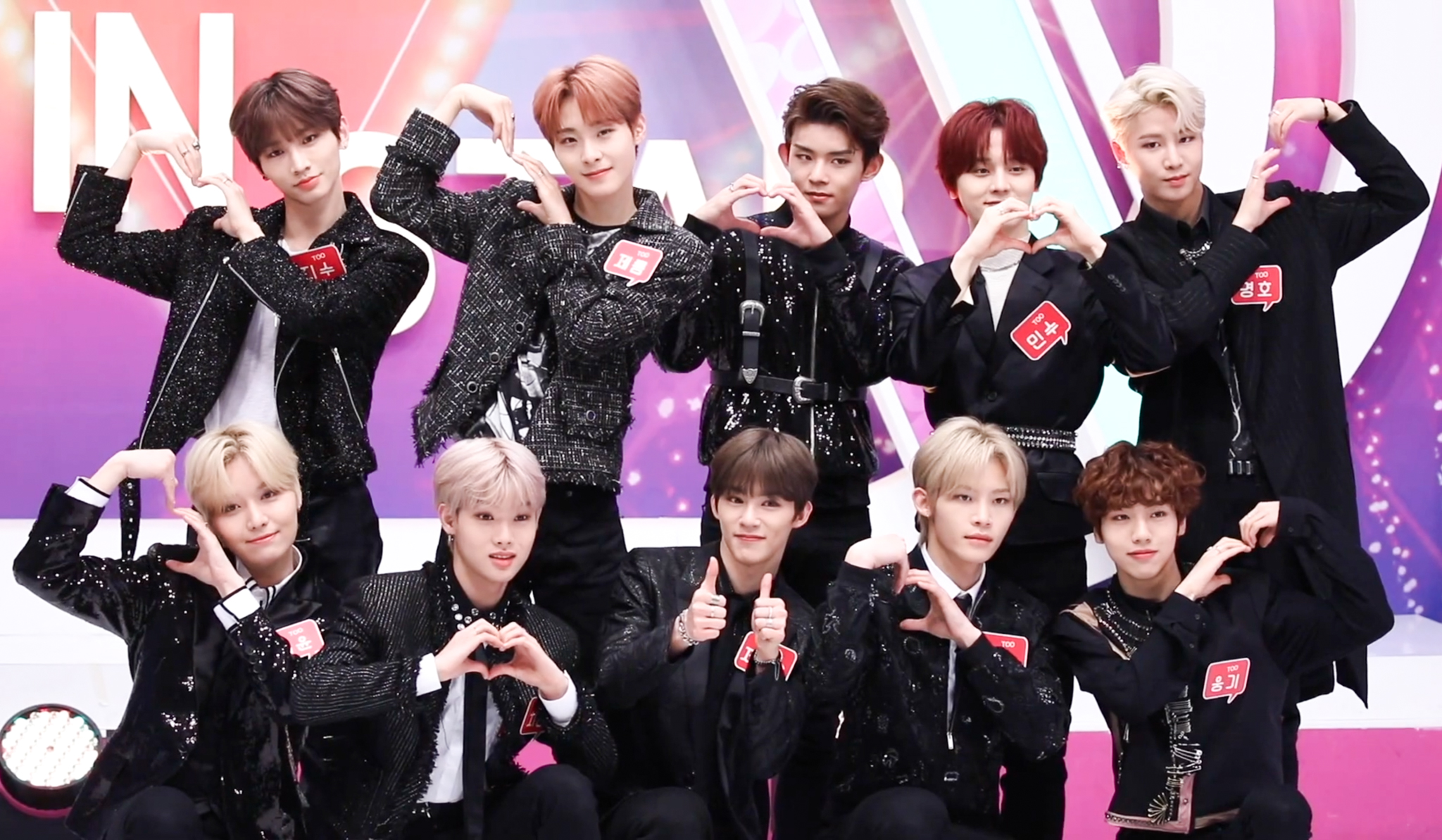 #티오오 #TOO #팩트인스타 #치훈 #동건 #찬 #지수 #민수 #재윤 #제이유 #경호 #제롬 #웅기 13일 오후 서울 상암동 TBS 스튜디오에서 진행되는 'TBS 팩트인스타 - TOO 편' 녹화가 있었다. TOO가 MC준과 포토타임을 갖고 있다. Copyright© 2020 the JH Media Co. All rights reserved.